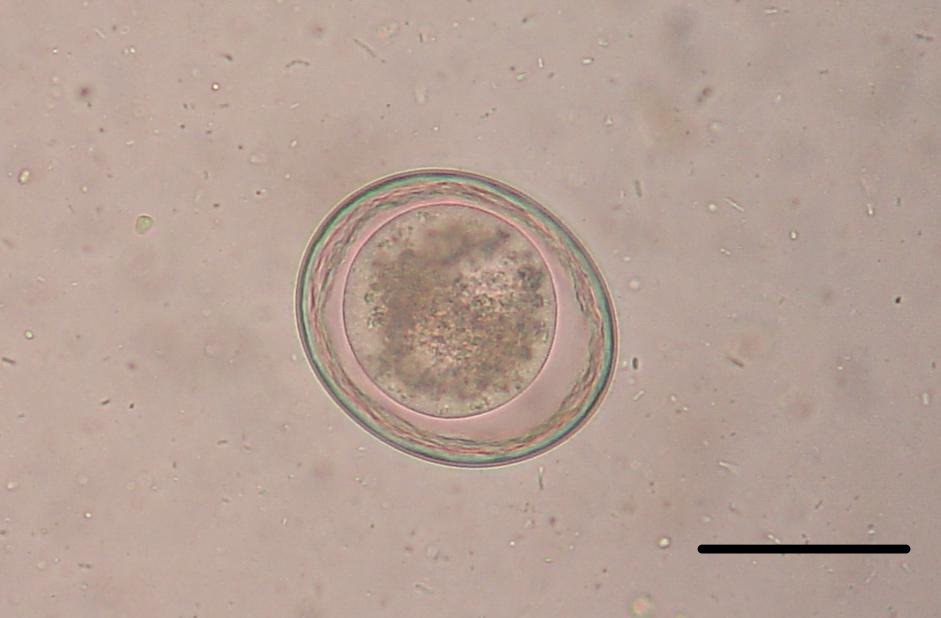 A canine roundworm (Toxascaris leonina) egg. Photo taken through a microscope at 400x. Scale bar = 50 micrometres. Česky: Vajíčko škrkavky šelmí - Toxascaris leonina. Fotka byla pořízena pod mikroskopem při zvětšení 400×. Černé měřítko vpravo dole představuje 50 μm.